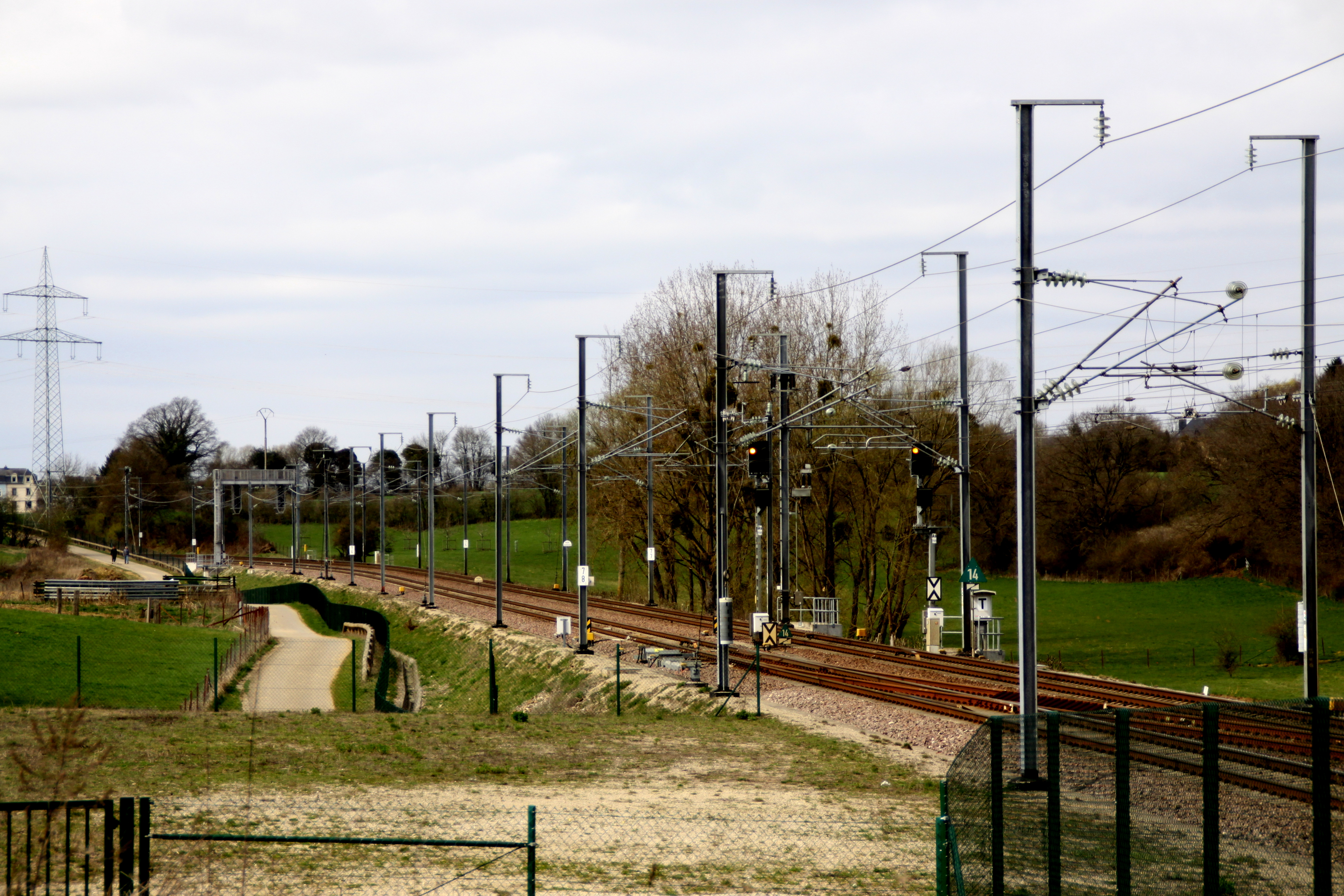 Ligne CFL 7 au PK 7.750Lëtzebuergesch: CFL-Linn 7 um PK 7.750